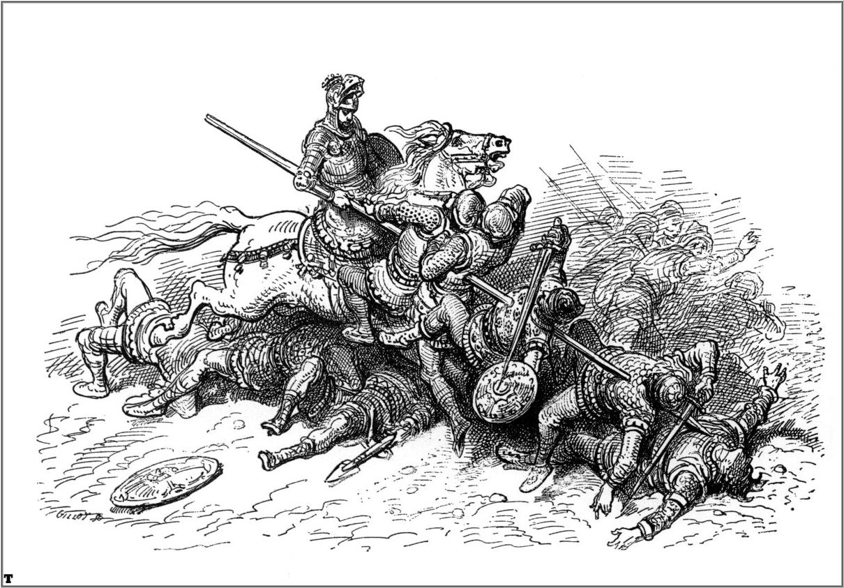 illustration of Ludovico Ariosto’s “Orlando Furioso”.